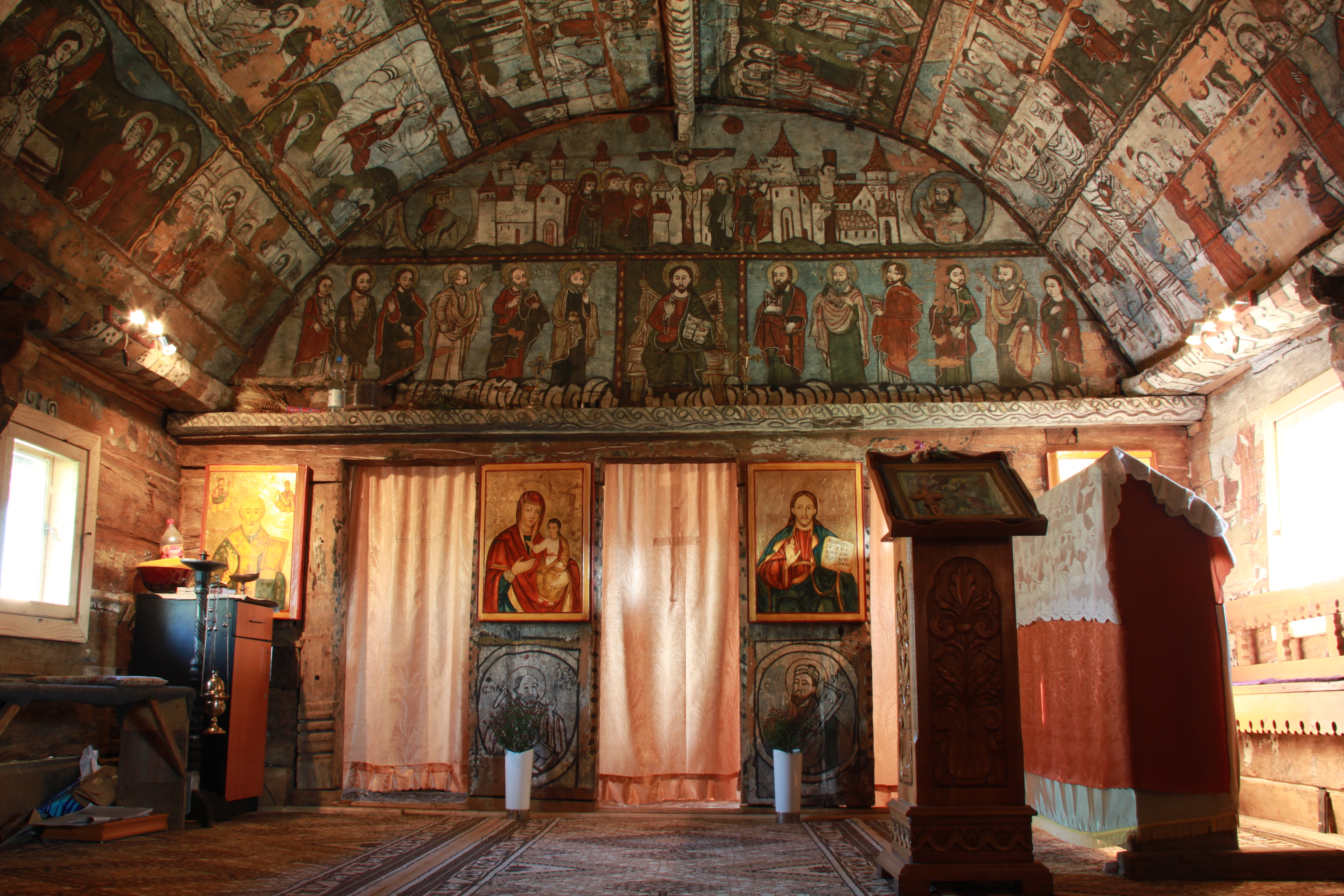 October 2010